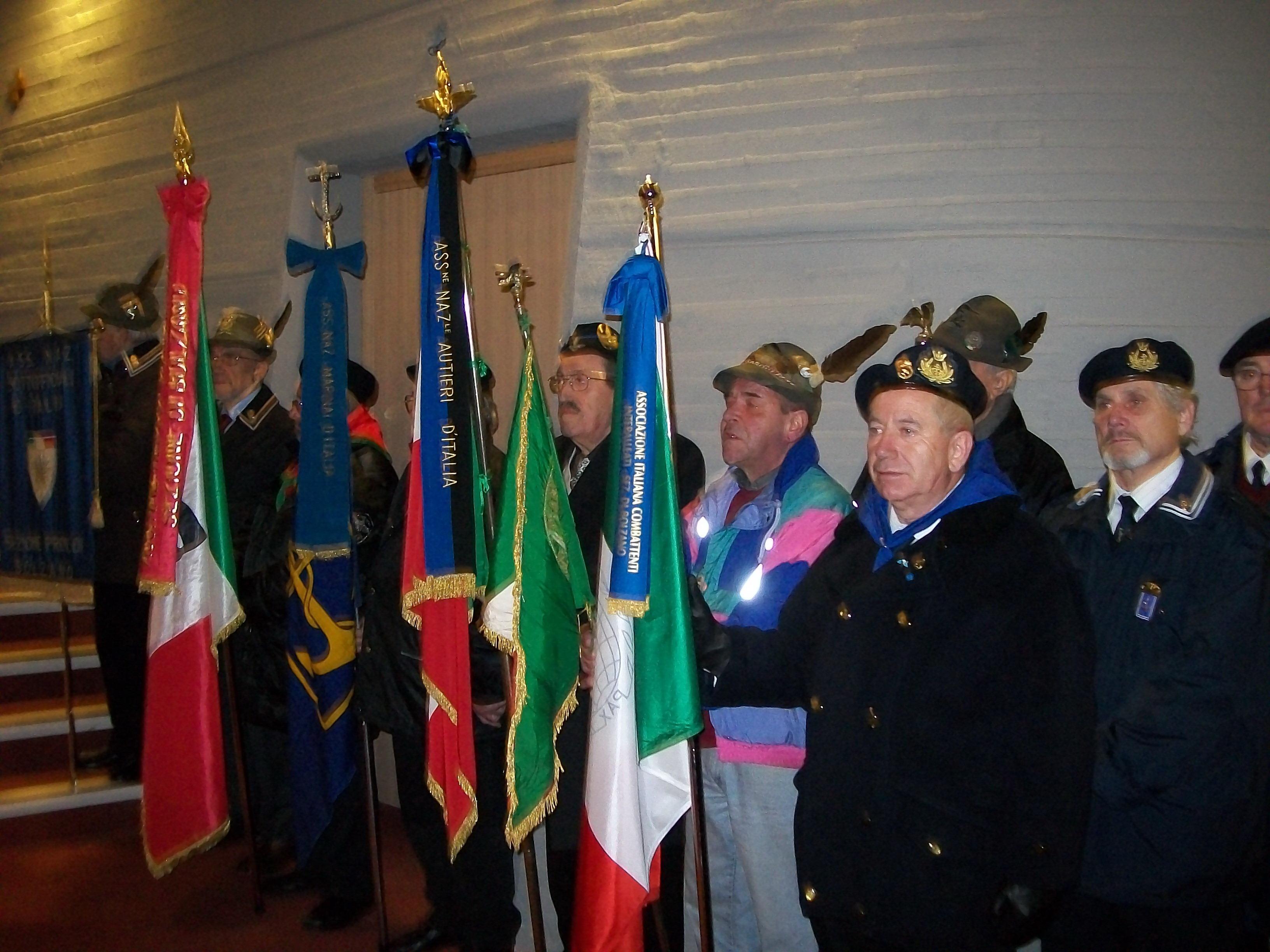 Il Natale del Combattente a Bolzano